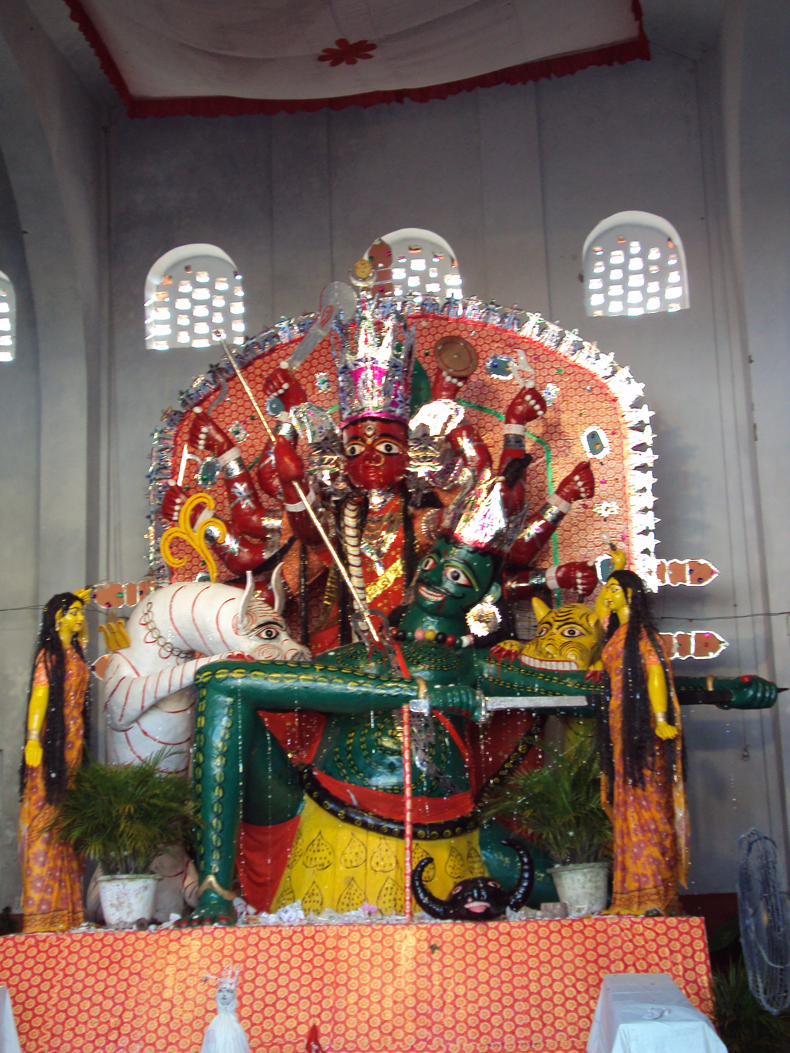 Bara devi, Cooch Behar